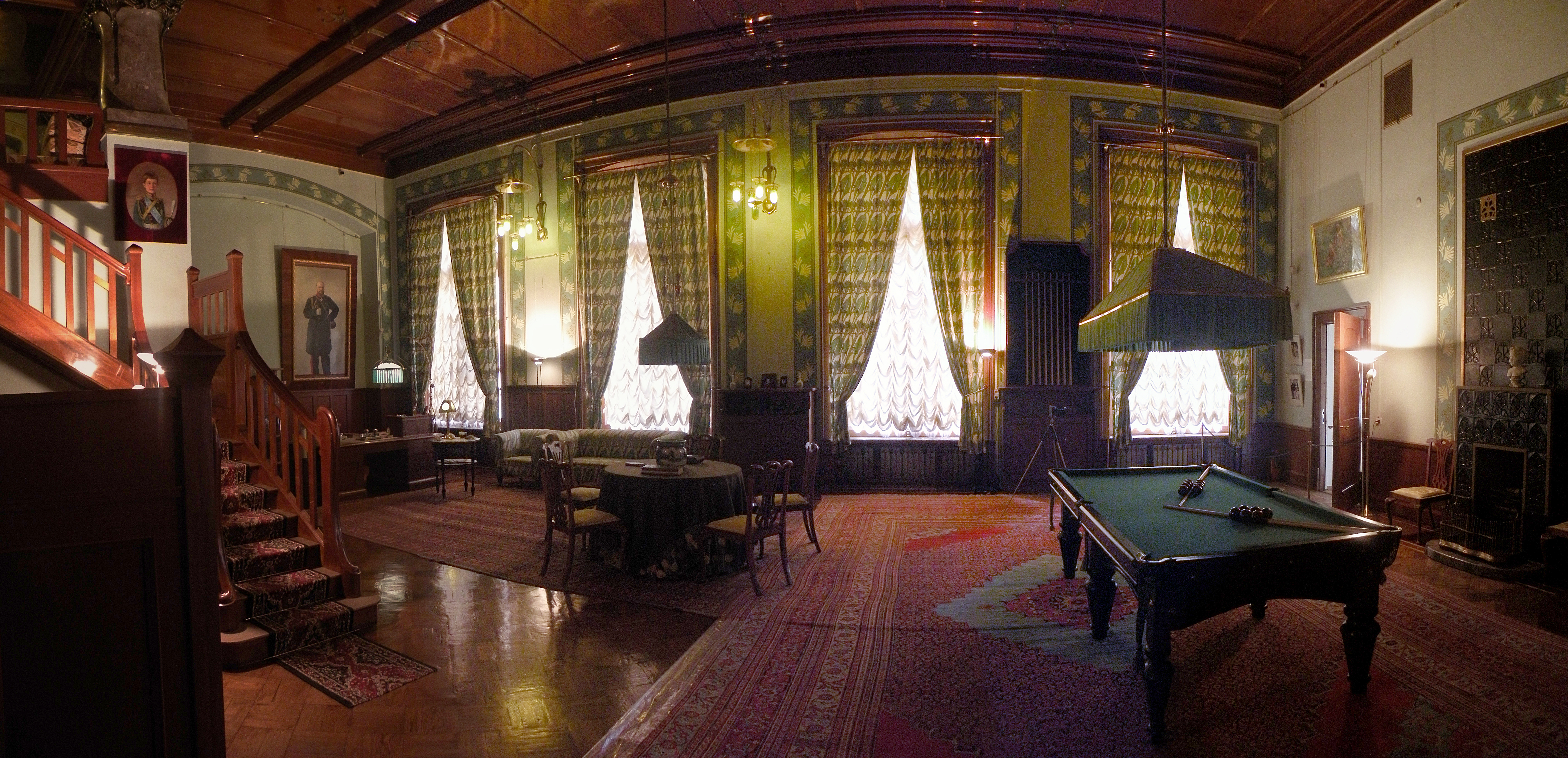 Дворец Александровский (со статуями) (Санкт-Петербург и Лен.область, Пушкин, Дворцовая улица, 2, Кабинет Николая II.Вид 2.